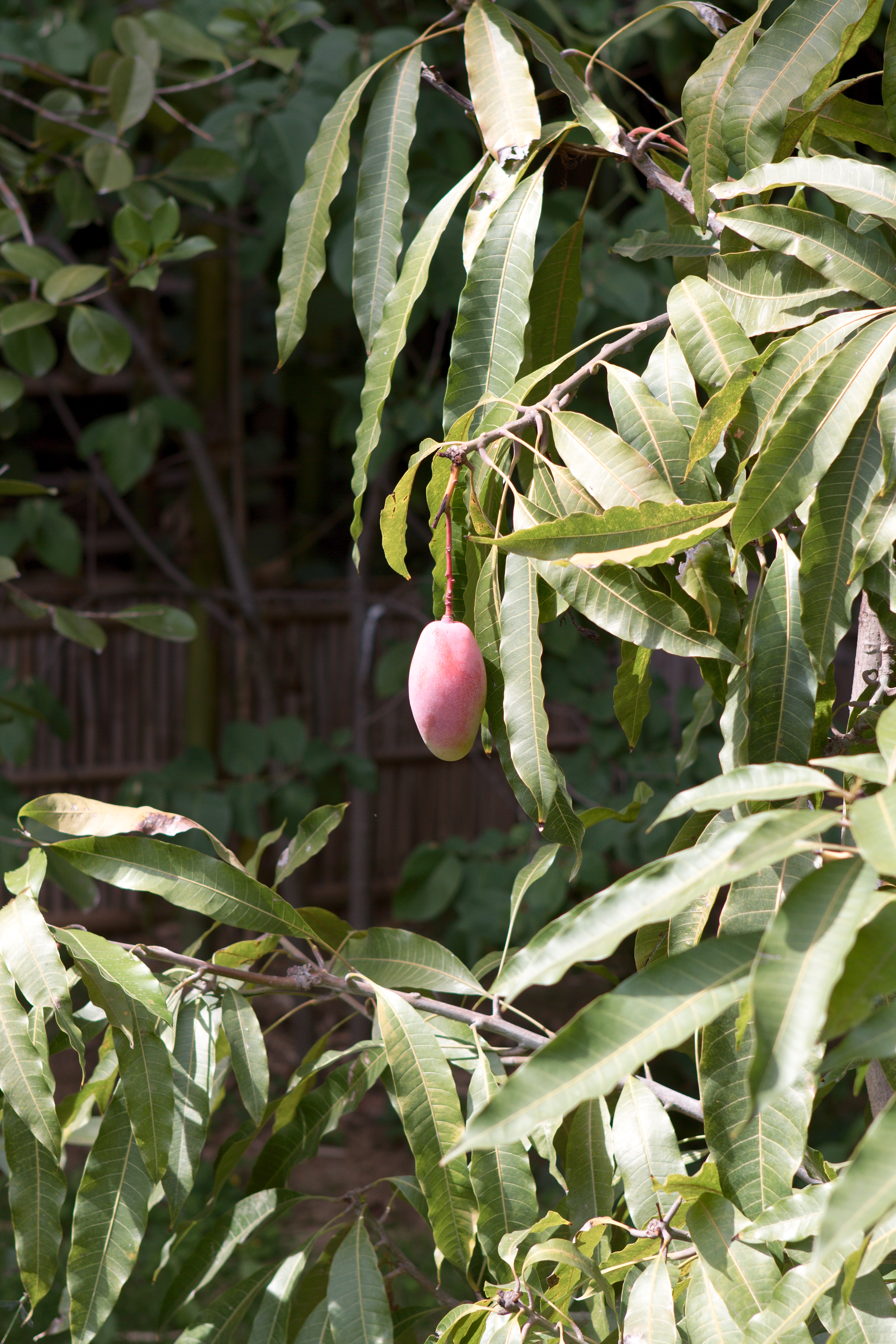 Goyavier (Psidium guineense) à la bambouseraie de Prafrance (Gard, France).